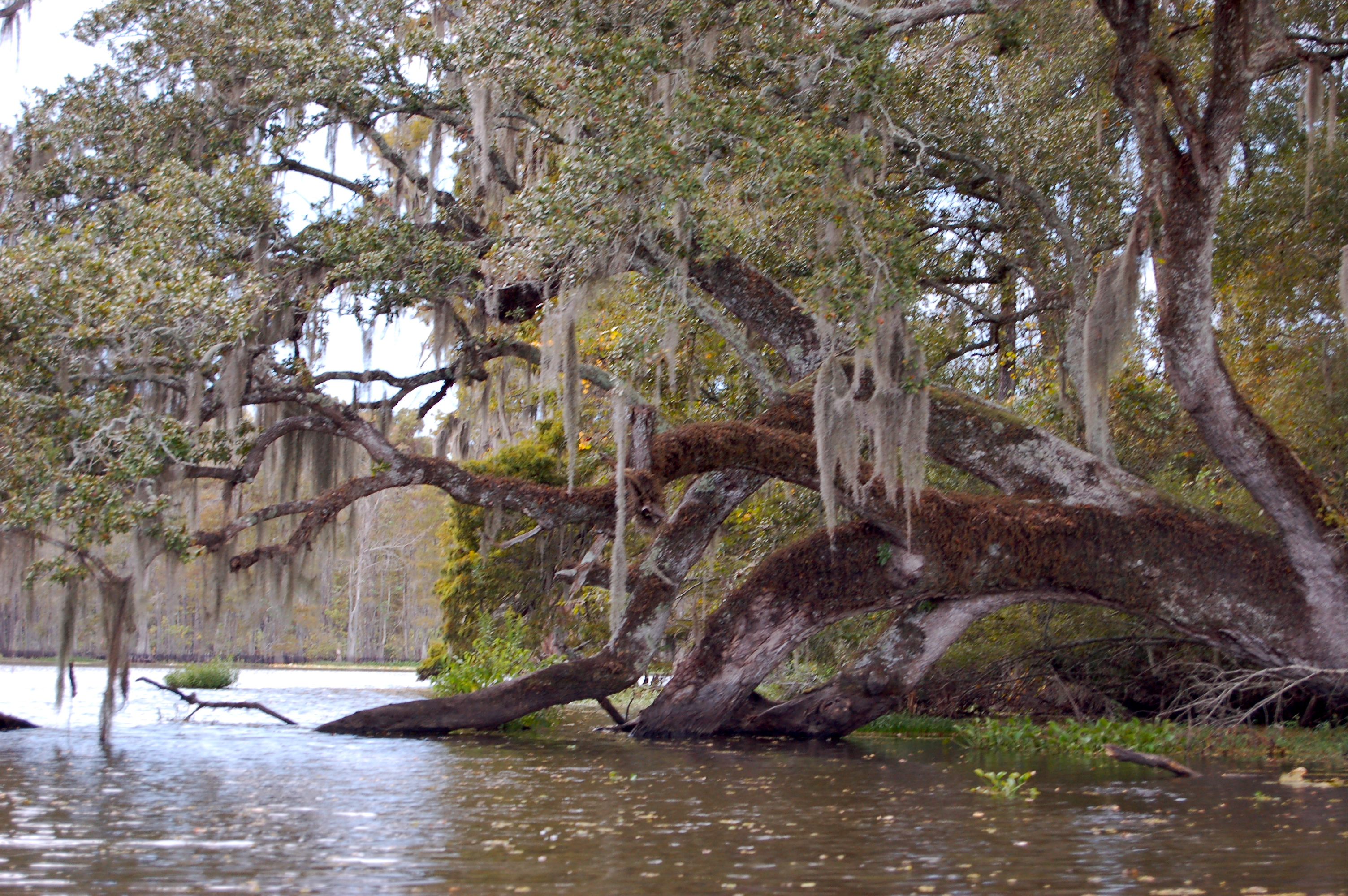 Along Bayou Corne, Louisiana